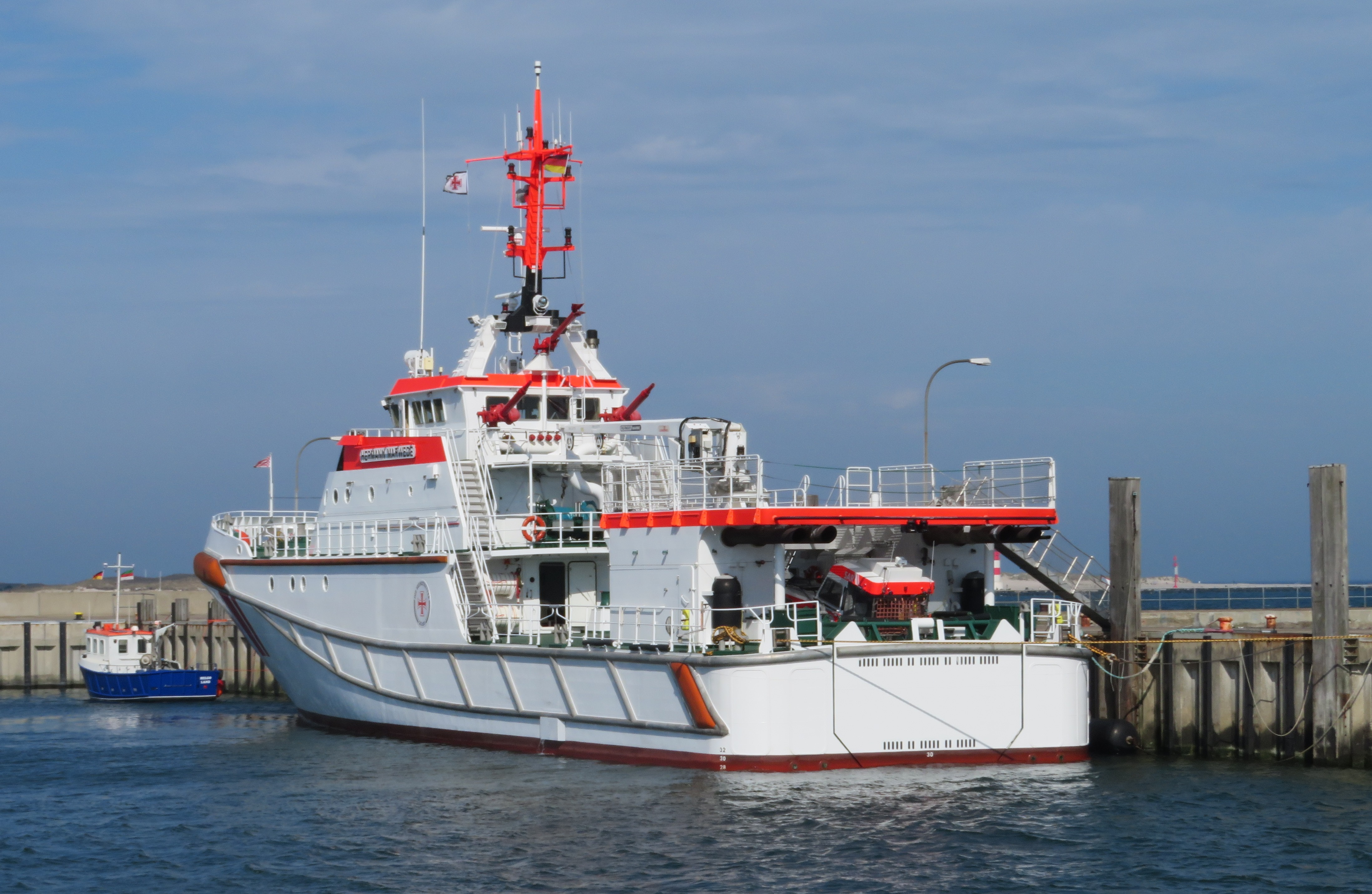 Hermann Marwede